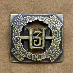 Odznaka 3 puł